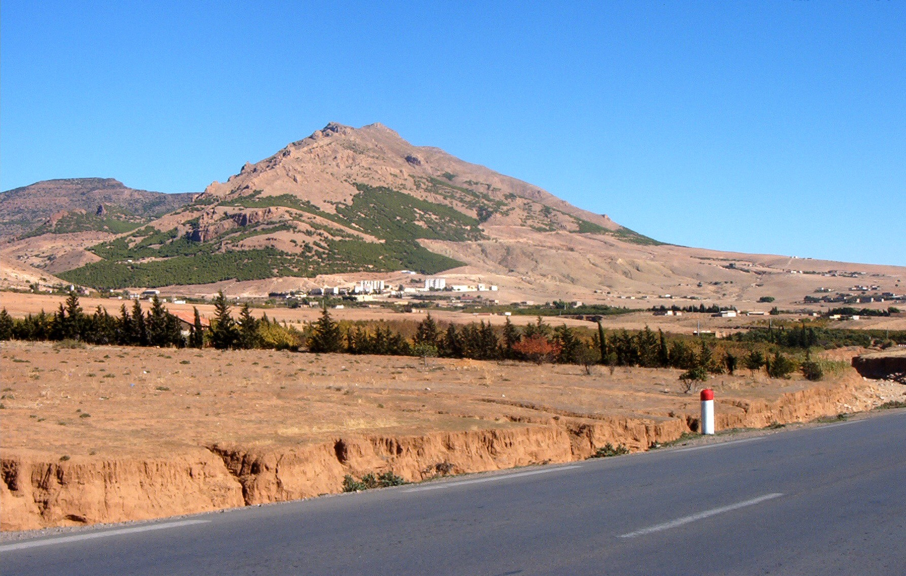 L'entrée de Ras el Aïoun